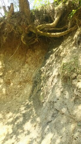 露頭に向かって左側の領家変成帯（内帯）に、マグマから固まってできた花崗岩がさらに変形した岩石が見られます。右側は三波川変成帯（外帯）で、結晶片岩（黒色片岩）が見られます。この地質境界が中央構造線です。